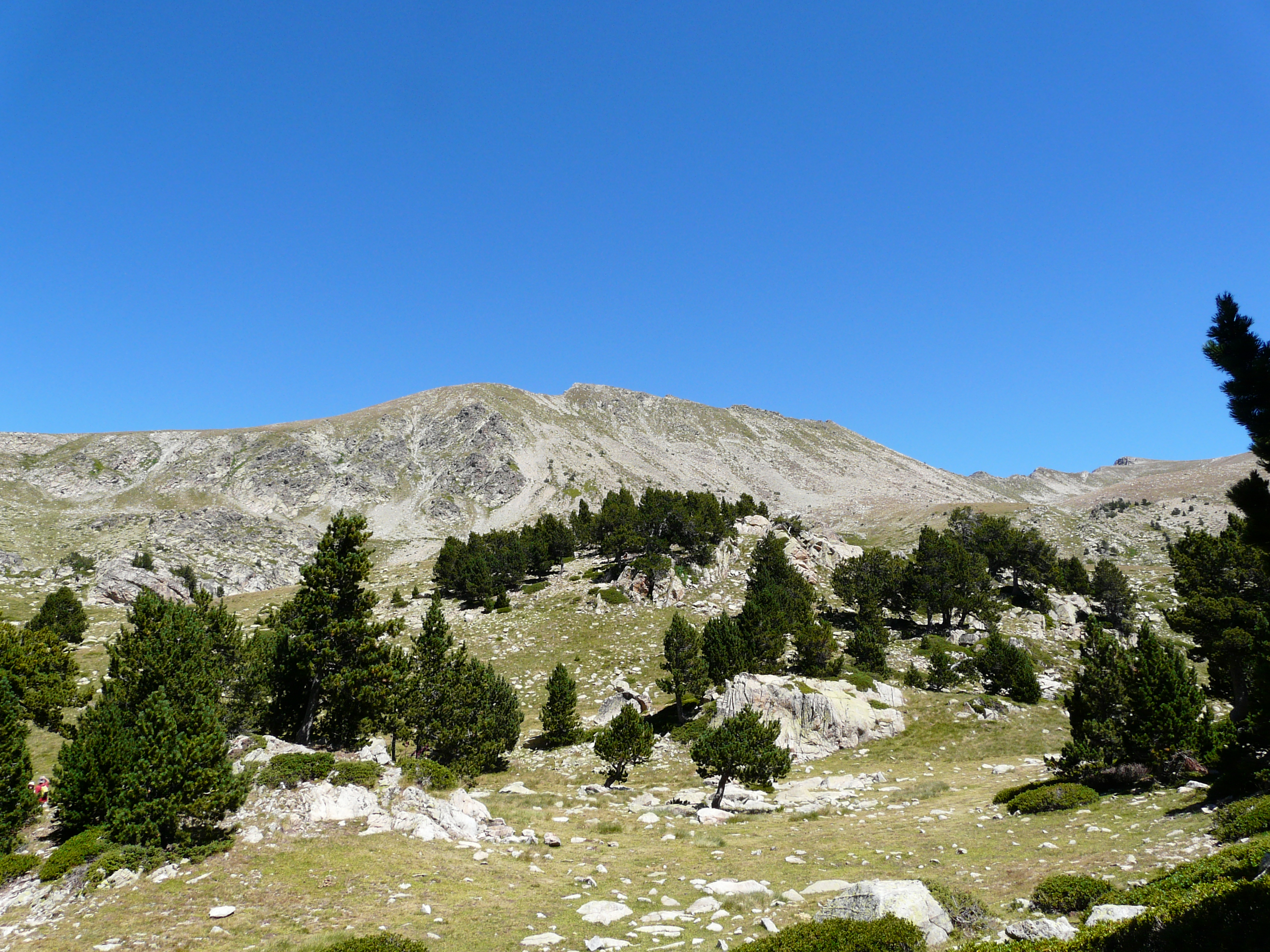 Estany Gran de la Pera (Cerdanya) (Lles de Cerdanya). Estanys i llacs d'alta muntanya. This is a a photo of a wetland in Catalonia, Spain, with id: IZHC-18001505 Object location42° 27′ 27″ N, 1° 35′ 38.04″ E